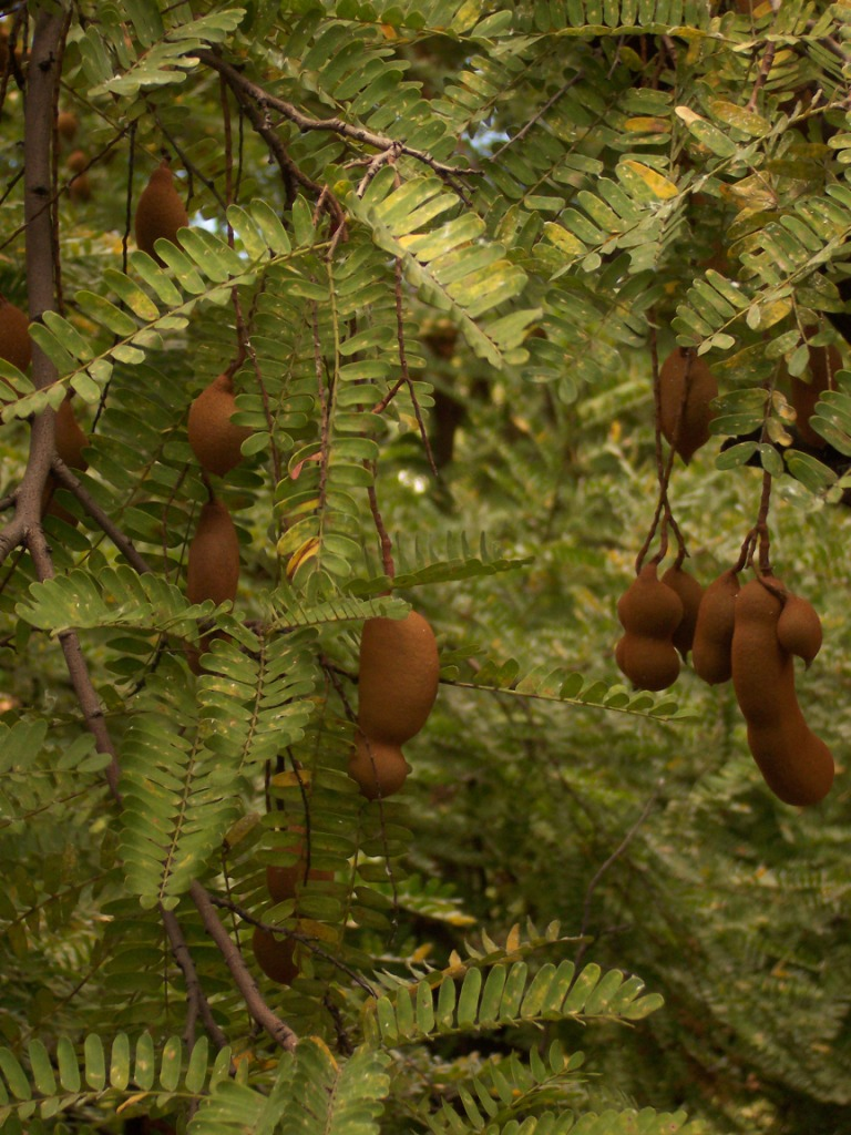 Tamarinier (Tamarindus indica) - pods photo: B.navez - 12 SEP 2005 - Réunion Island